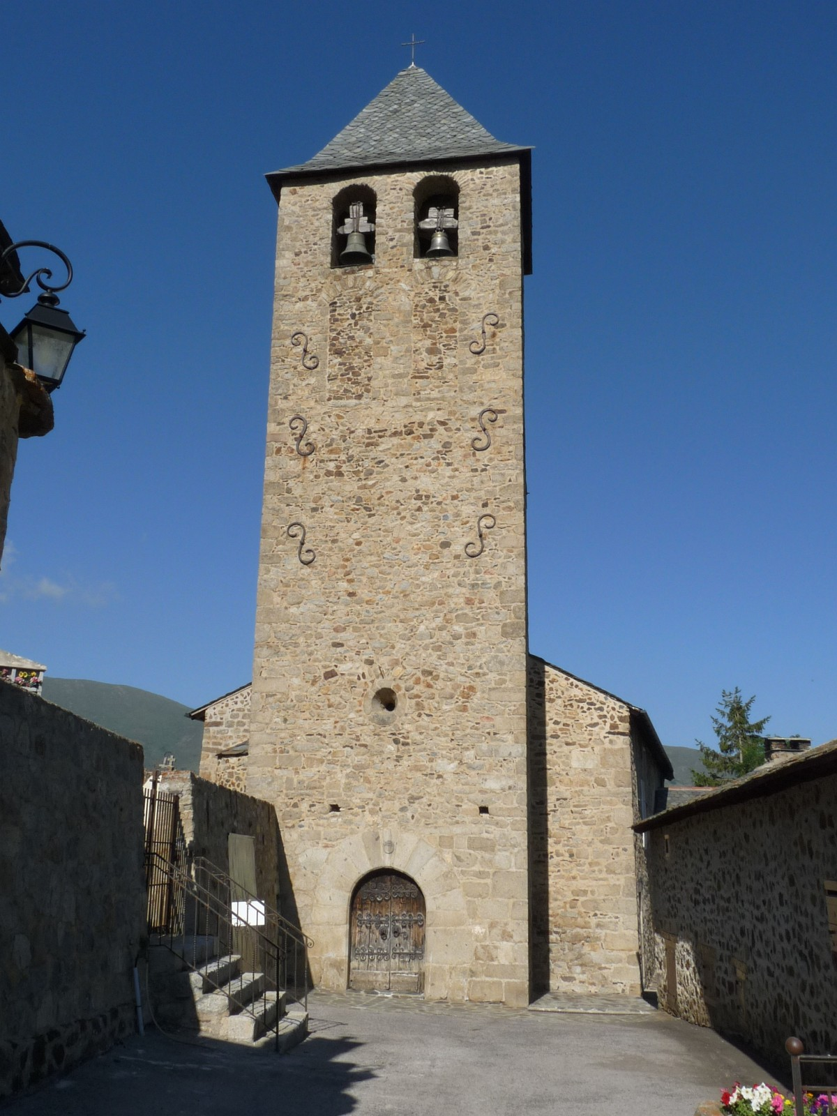 Eglise d'Ayguatébia, Pyrénées-Orientales, France